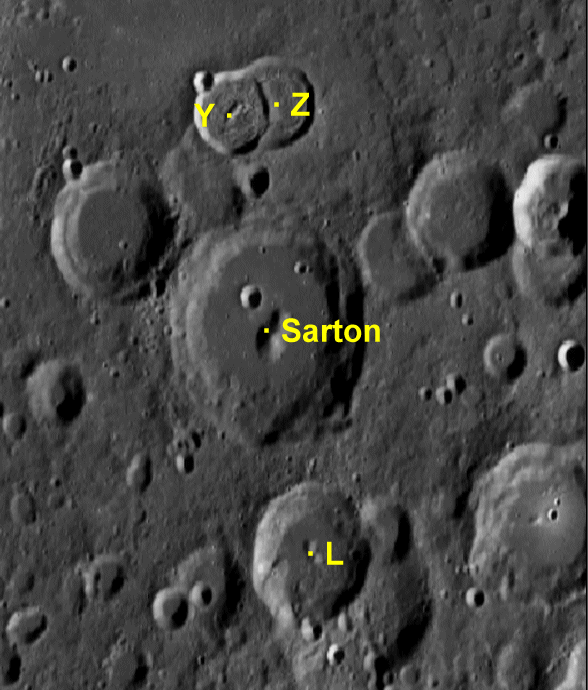 Cráter lunar Sarton. Cráteres Satélite. (Imagen LRO)